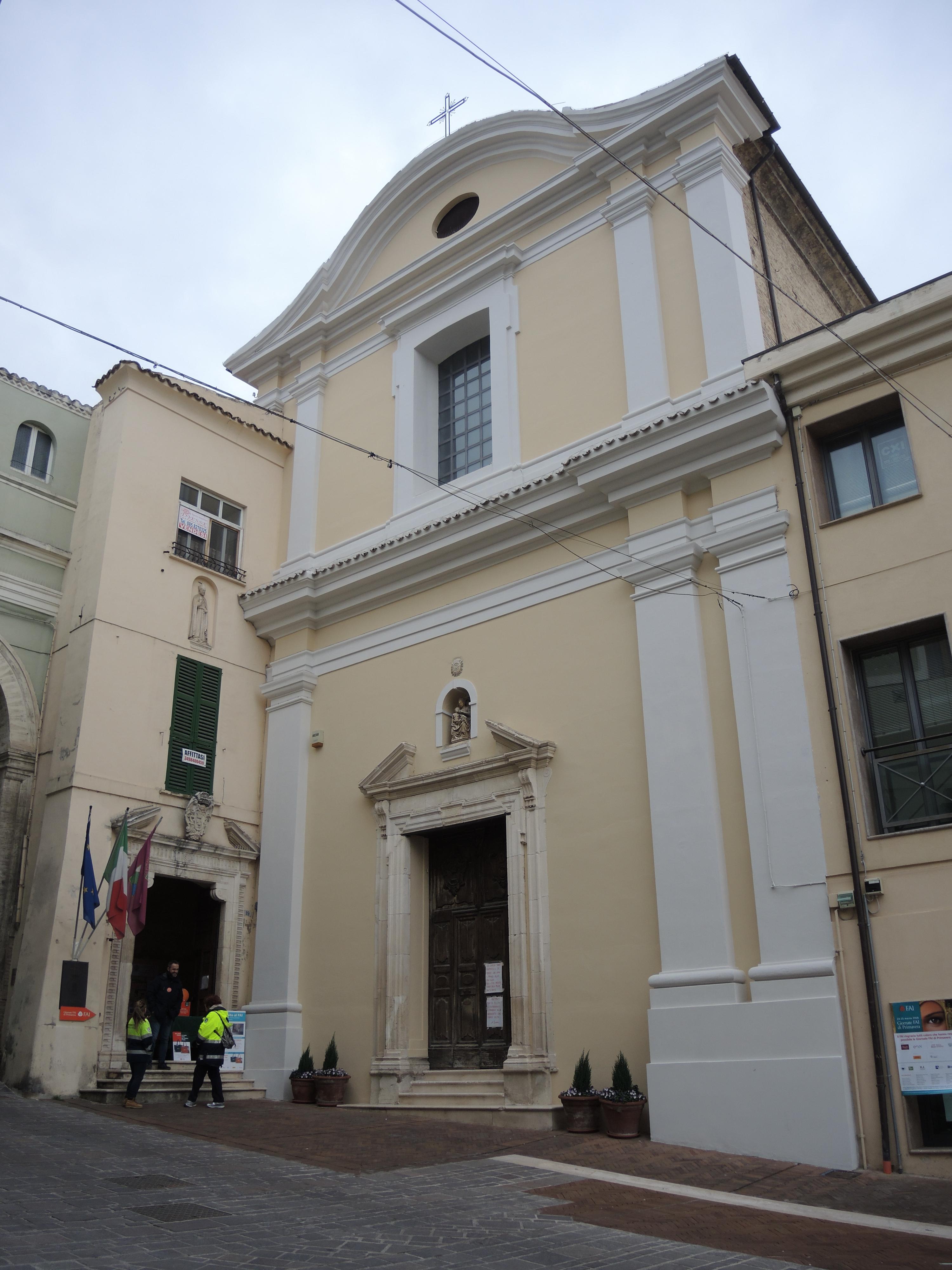 Penne: Chiesa di San Domenico